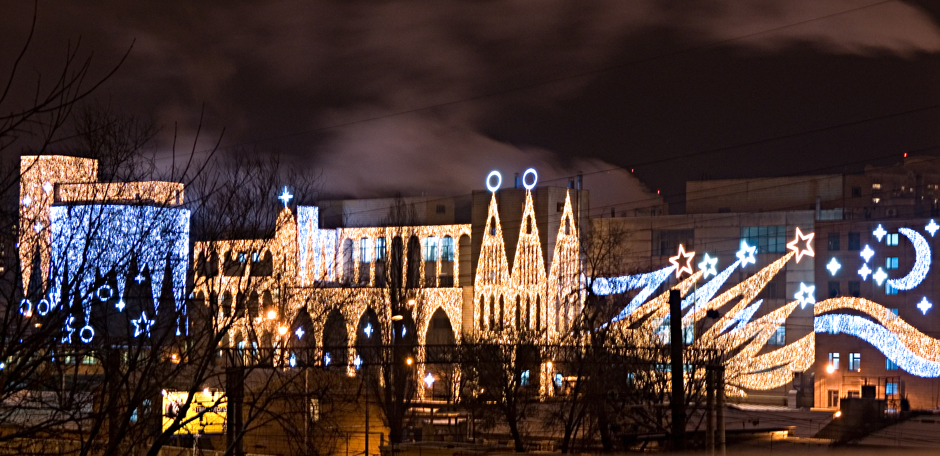 Україна, Київ - Кондитерська фабрика ім. К. Маркса, народні ополченці якої брали участь в обороні м. Києва